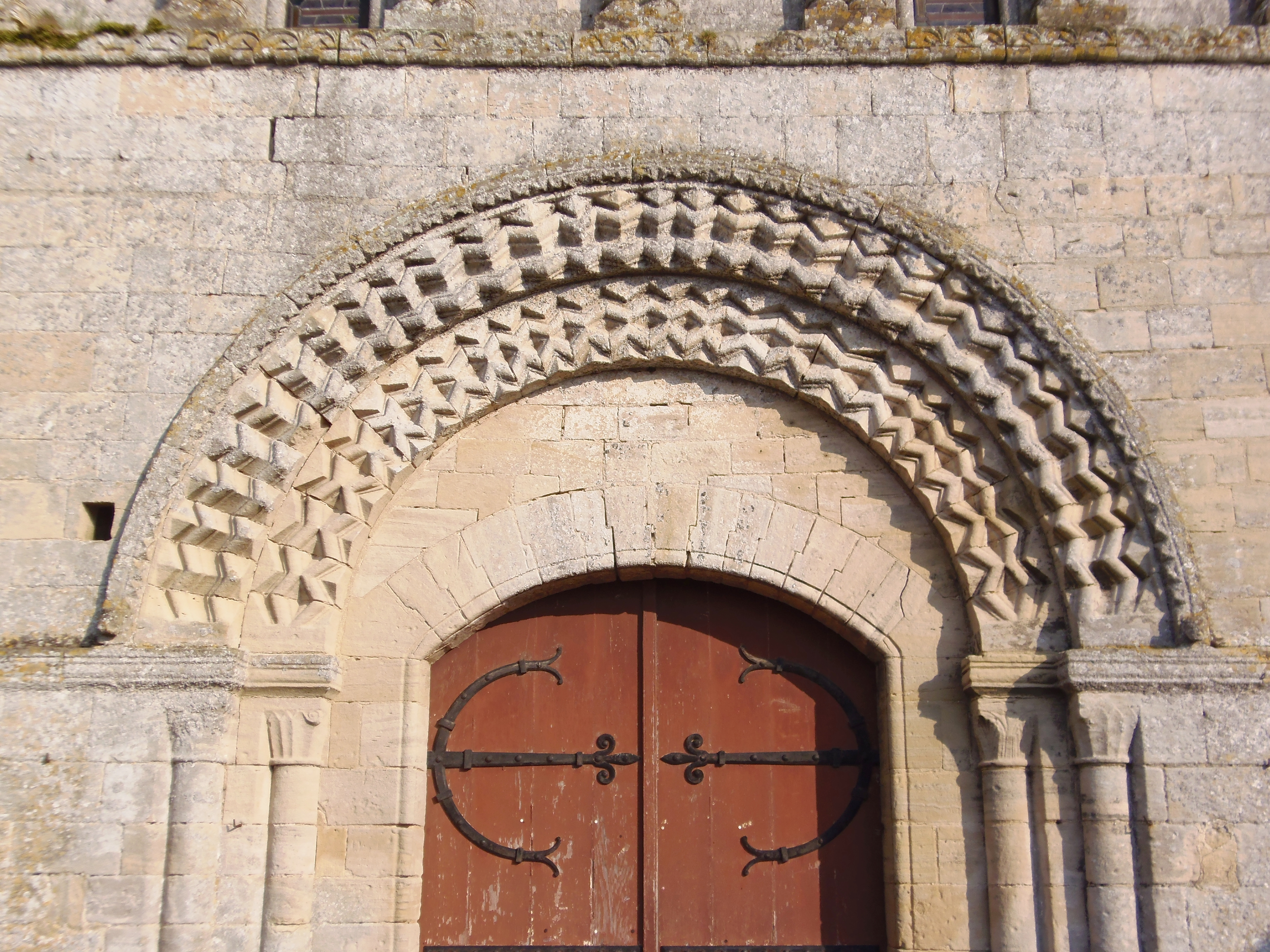 Le Fresne-Camilly (Normandie, France). Archivoltes du portail de l'église Notre-Dame.